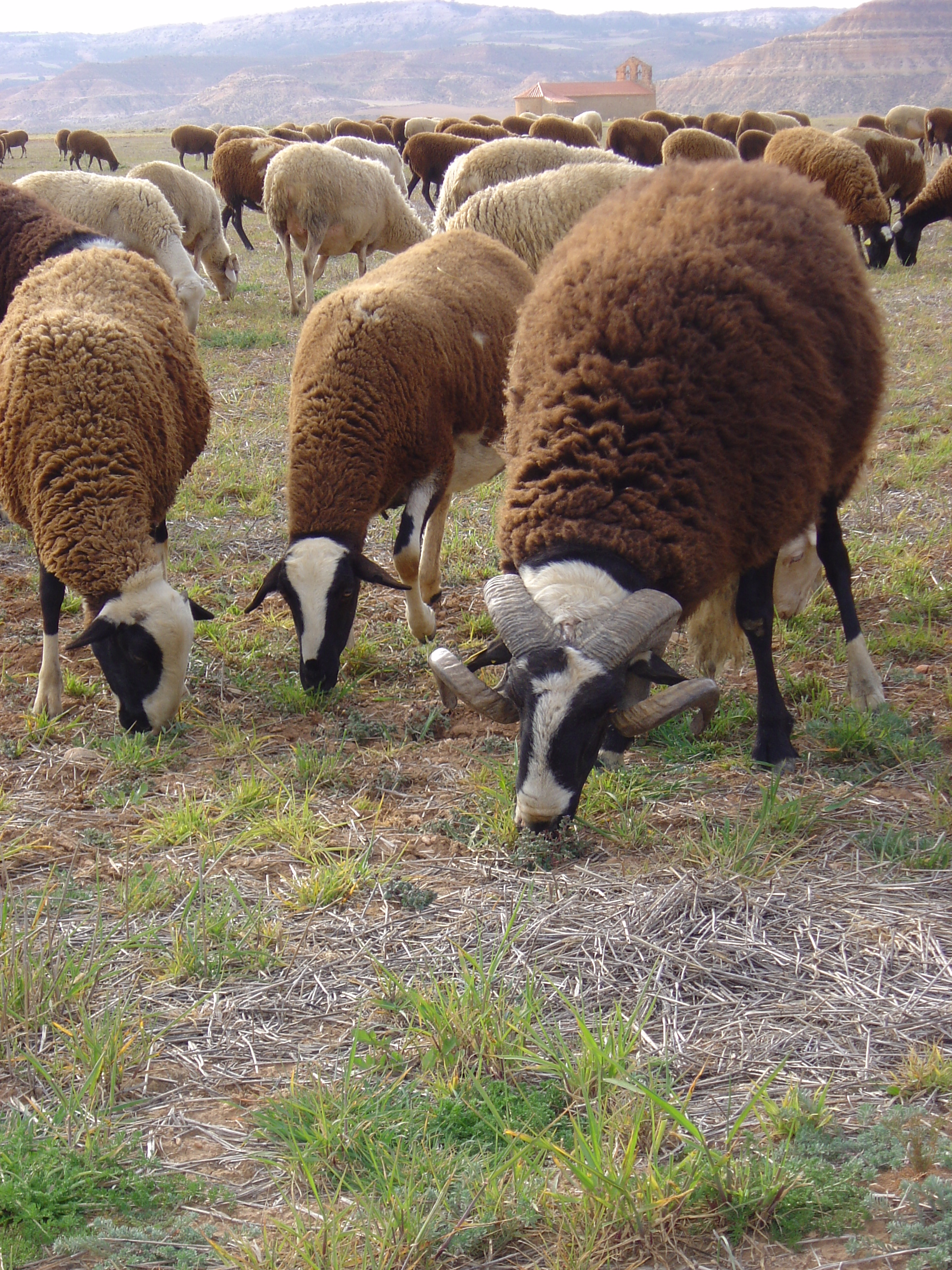 Ovejas royas bilbilitanas en la ribera del río Jalón